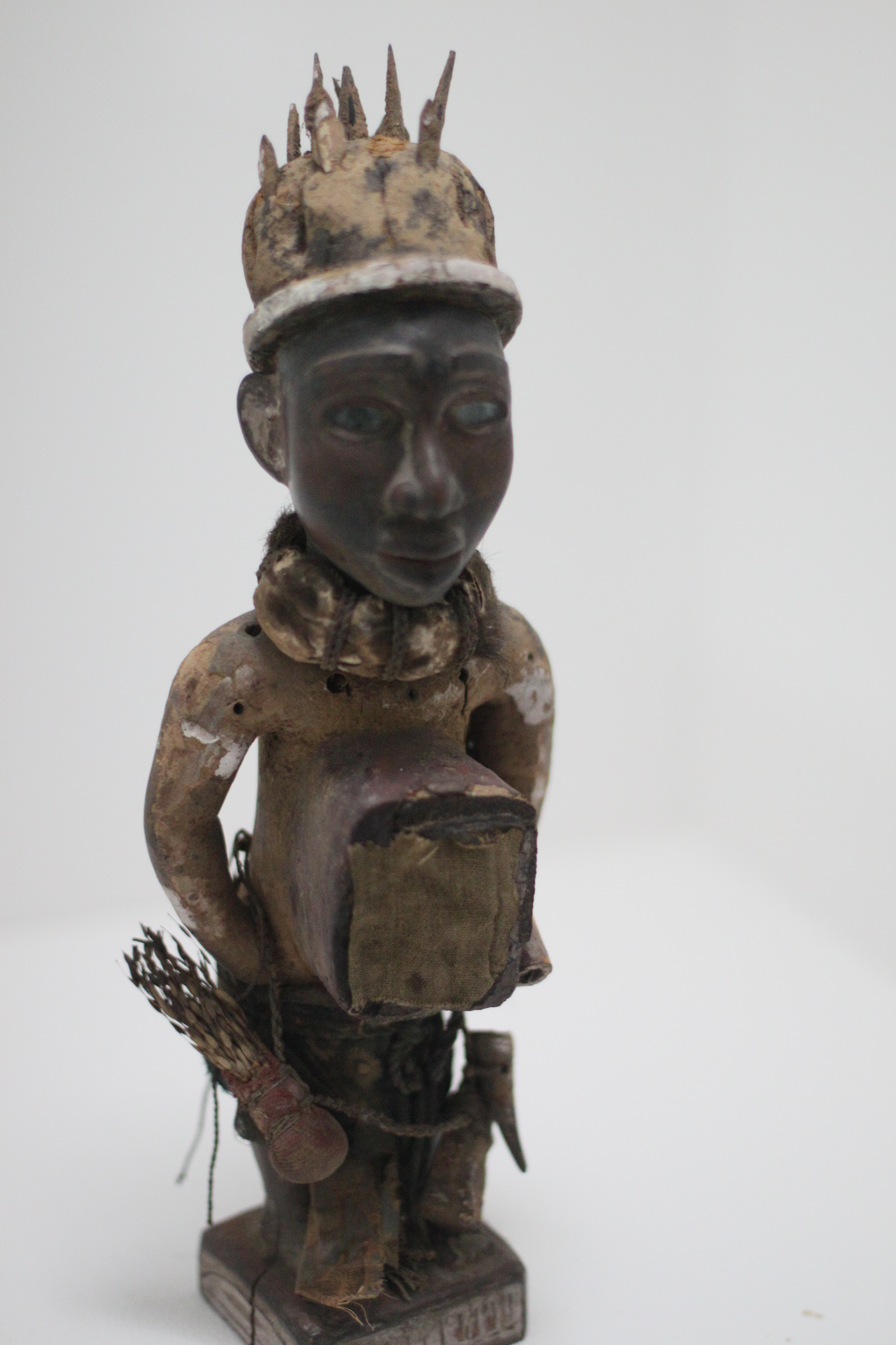 Kraftfigur nkisi, Republik Kongo, Loango; Holz, Eisen, Pflanzenfaser, Glas, Fell, Blätter, Harz; Afrikaabteilung im Ethnologischen Museum, Berlin-Dahlem; Sammlung Robert Visser, erworben 1901